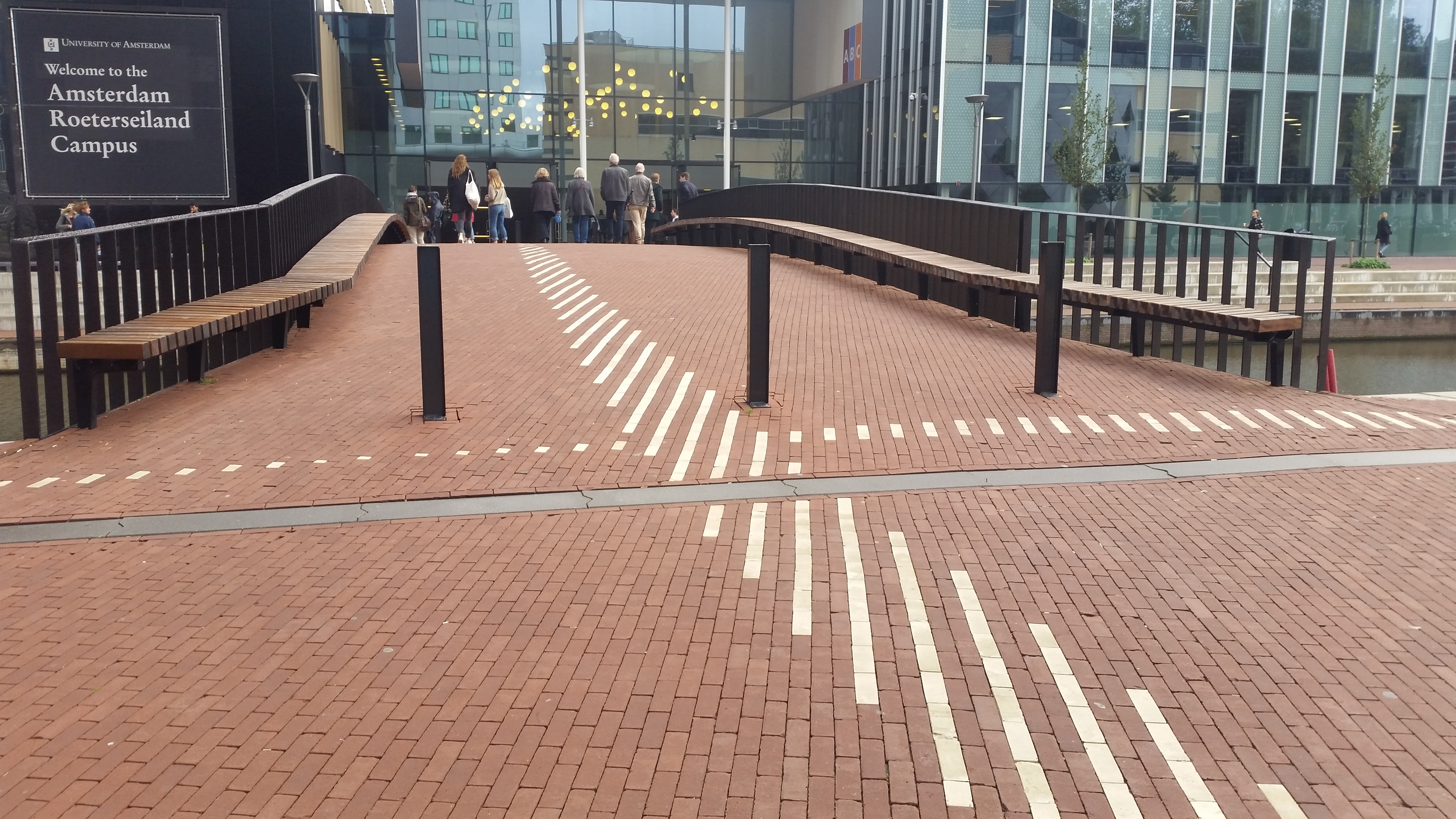 Vooraanzicht Voetbrug Roeterseiland